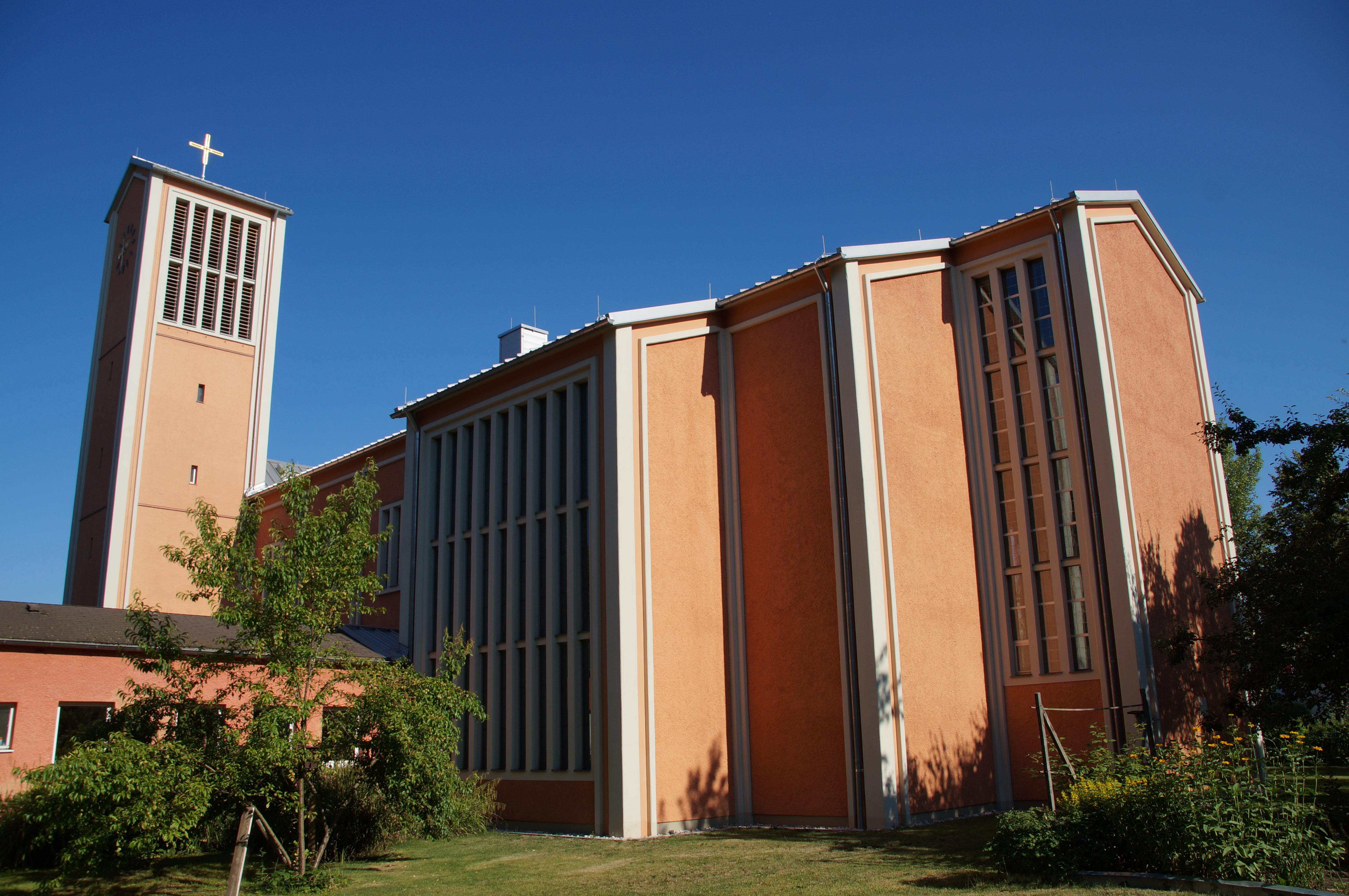 Katholische Pfarrkirche Mater Dolorosa, giebelständiger Saalbau mit Flachsatteldach, eingezogenem Chor mit Anräumen und Flankenturm, Stahlbeton-Rasterbau, 1952-54 von Hans Beckers; mit Ausstattung